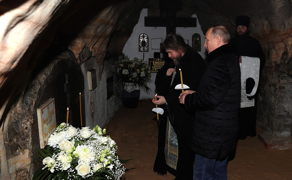 Президент Путин с митрополитом Тихоном в Псково-Печерском монастыре 18 ноября 2018 года